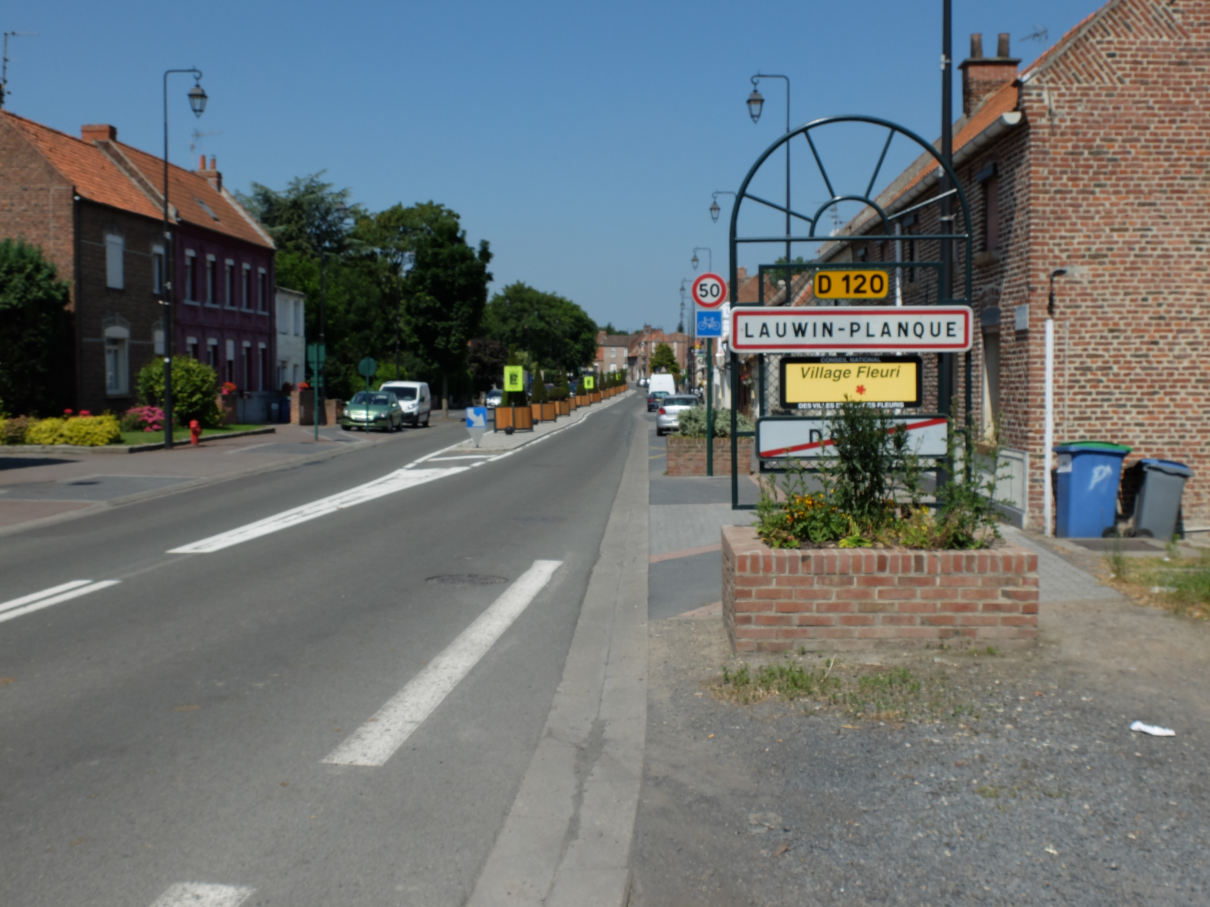 Vue d'une entrée de la commune de Lauwin-Planque.